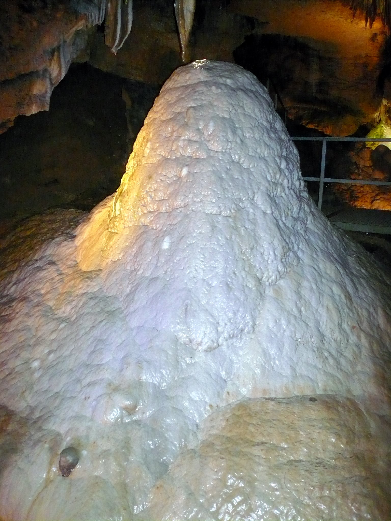 Sophienhöhle, Millionär